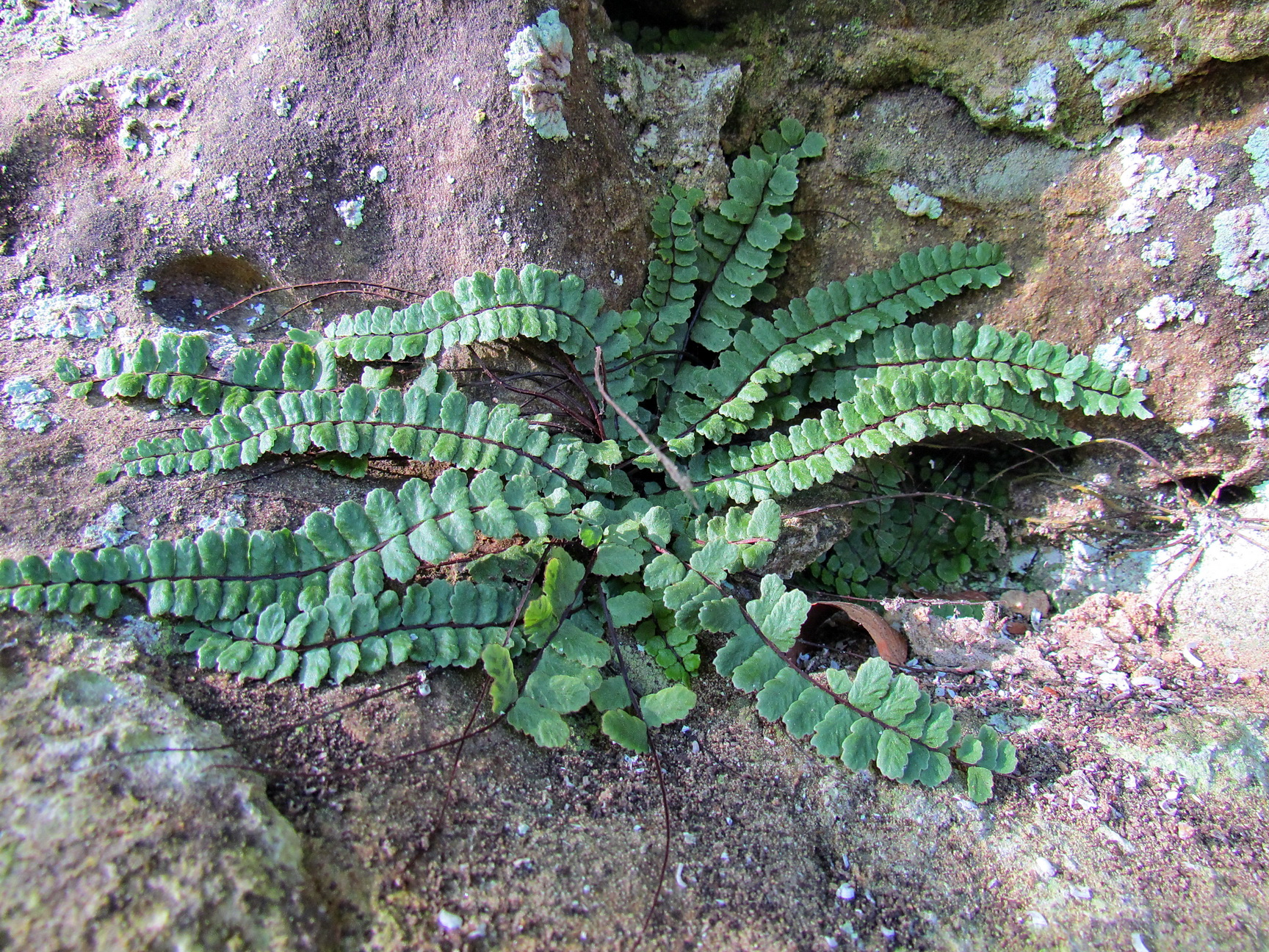 Asplenium trichomanes subsp. pachyrachis, Mullerthal, Luxembourg